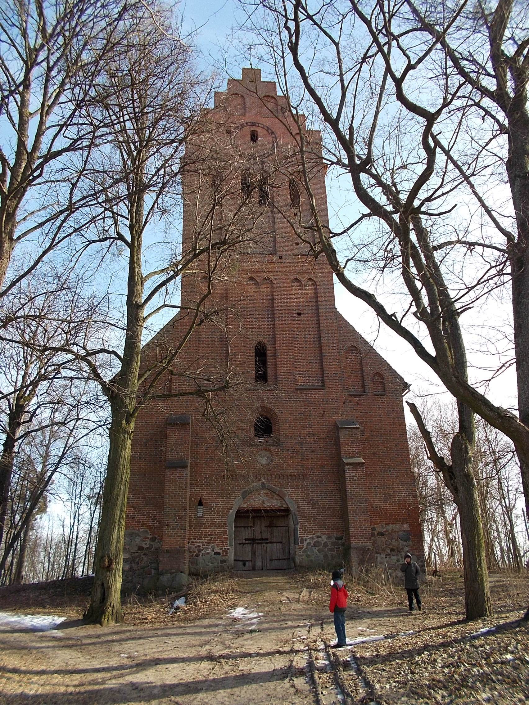 Кирха приходская (Калиниградская область, Правдинск, посёлок Домново)